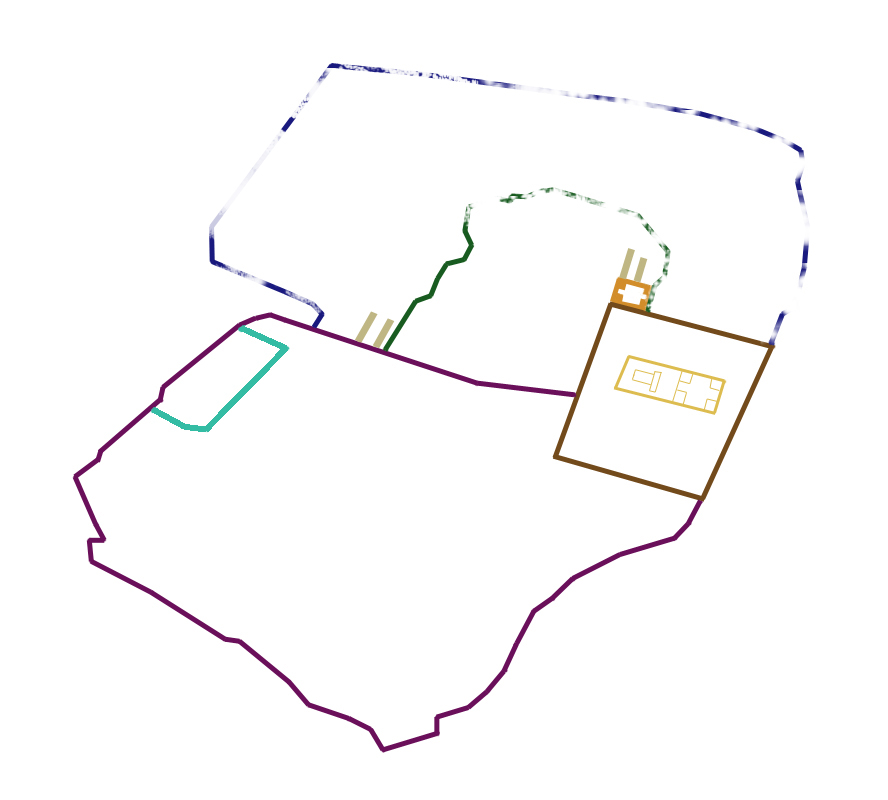 ירושלים 70 - רביעיית הסוללות